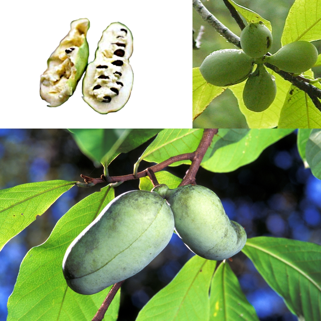 Grafika podręcznika Wikijunior:Owoce. Pawpaw, banan preriowy, asymina trójklapowa (Asimina triloba).